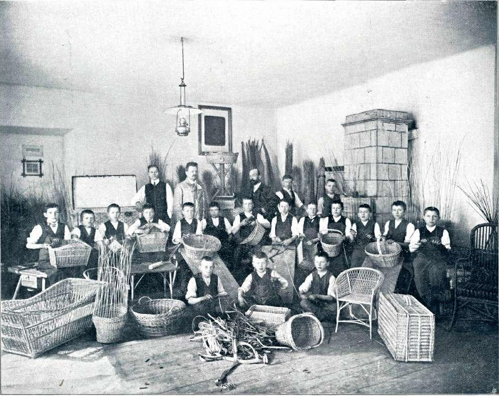 Pletarska šola v Radovljici.